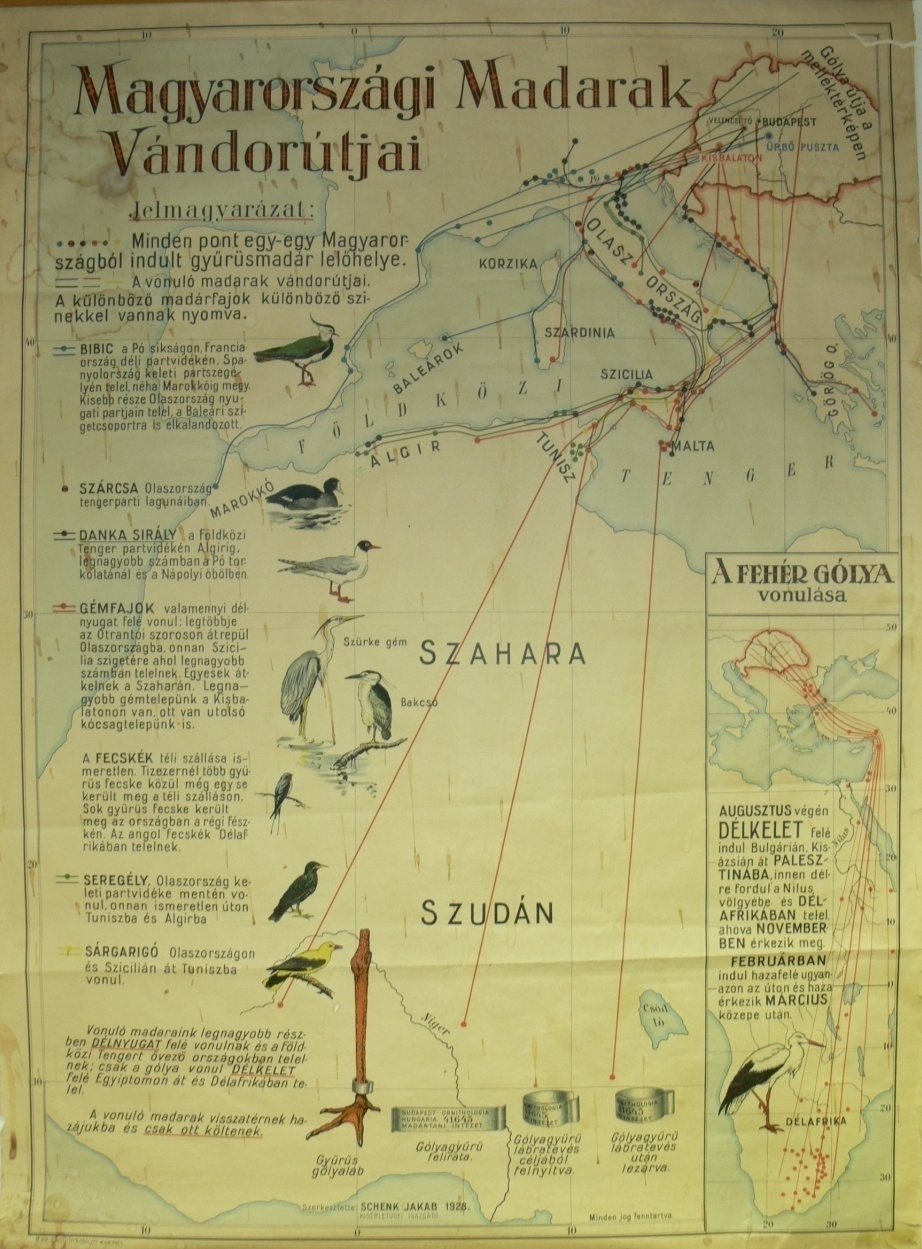 Magyarországi madárvonulás